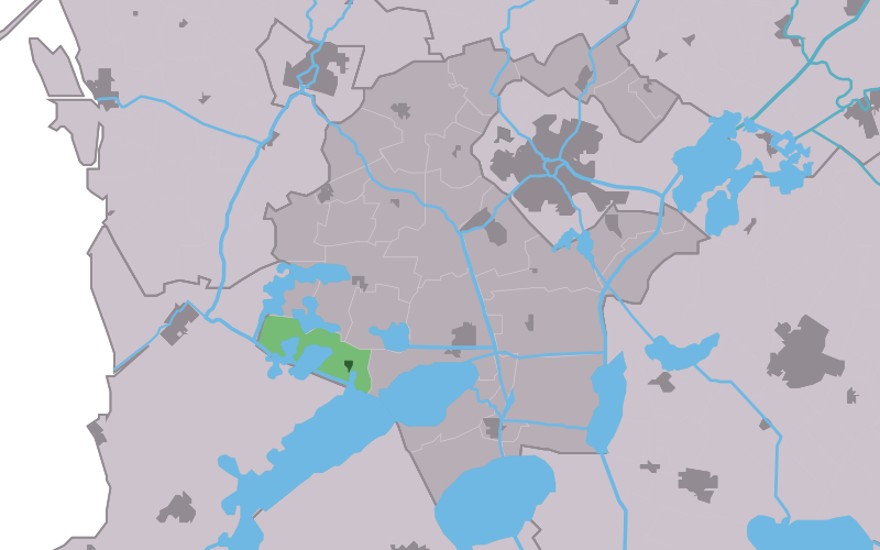 Kaartsje fan himrik fan De_Gaastmar.